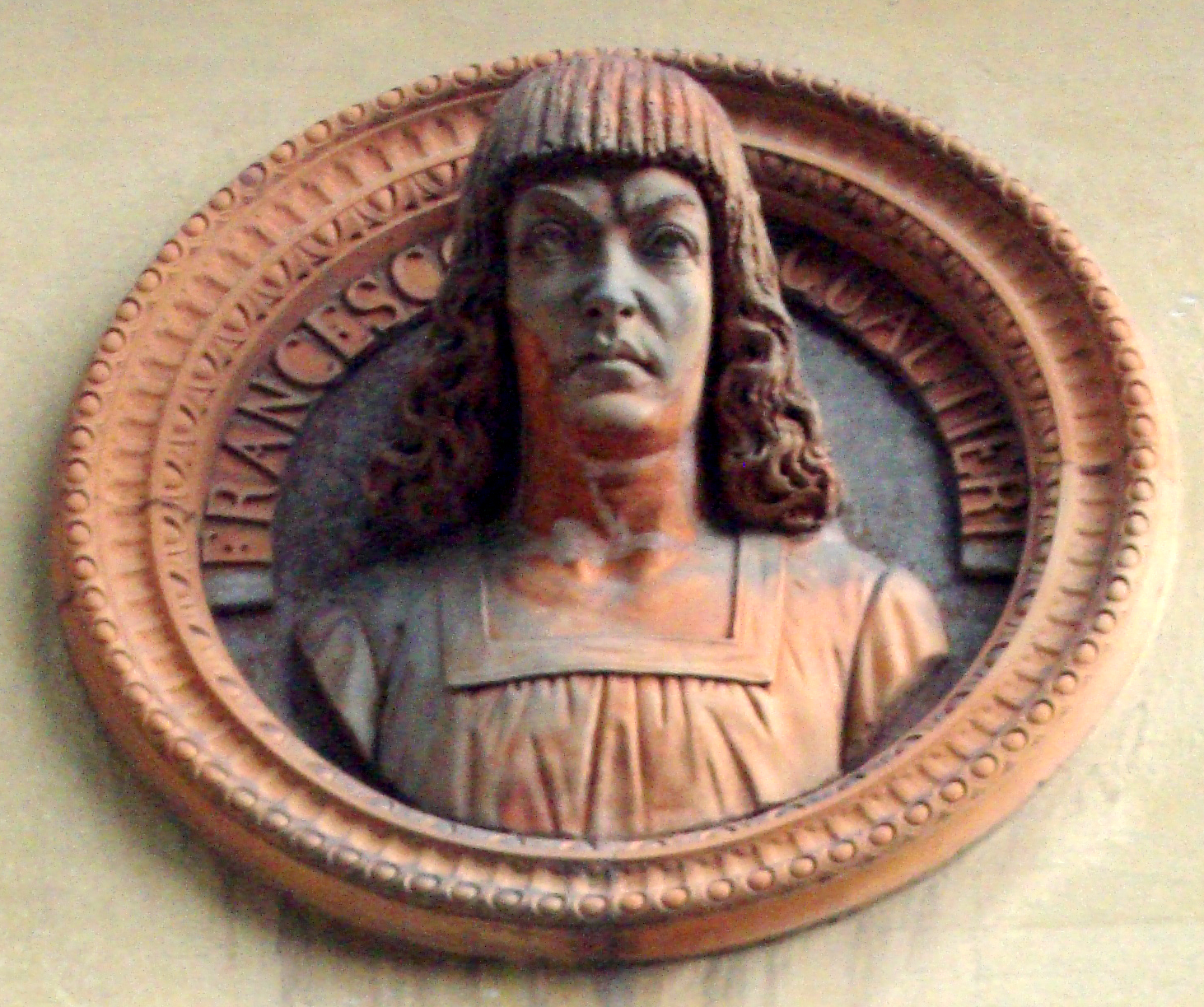 Schio, particolare della facciata del Teatro Jacquard This is a photo of a monument which is part of cultural heritage of Italy.